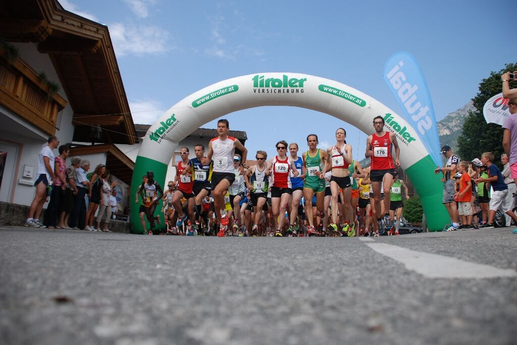 Start zum internationalen Schlickeralmlauf Berglauf im Ortszentrum von Telfes im Stubai, Tirol, Österreich